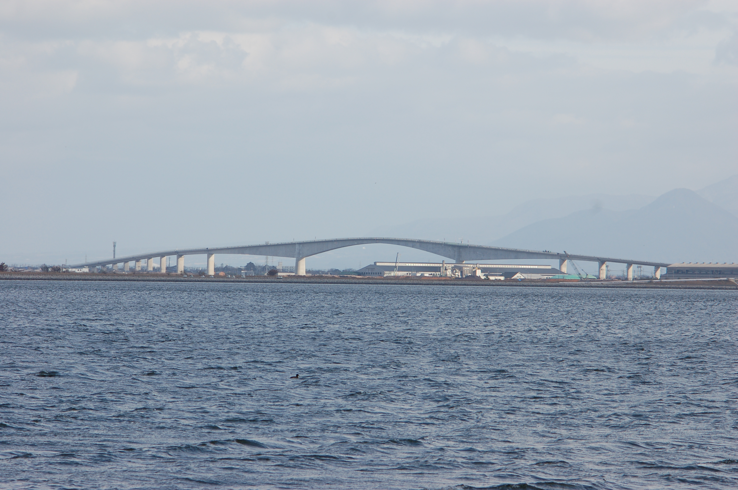 「ベタ踏み坂」として知られる江島大橋を北側から撮影した風景。横から見ると通称ほど急勾配な印象は受けない。